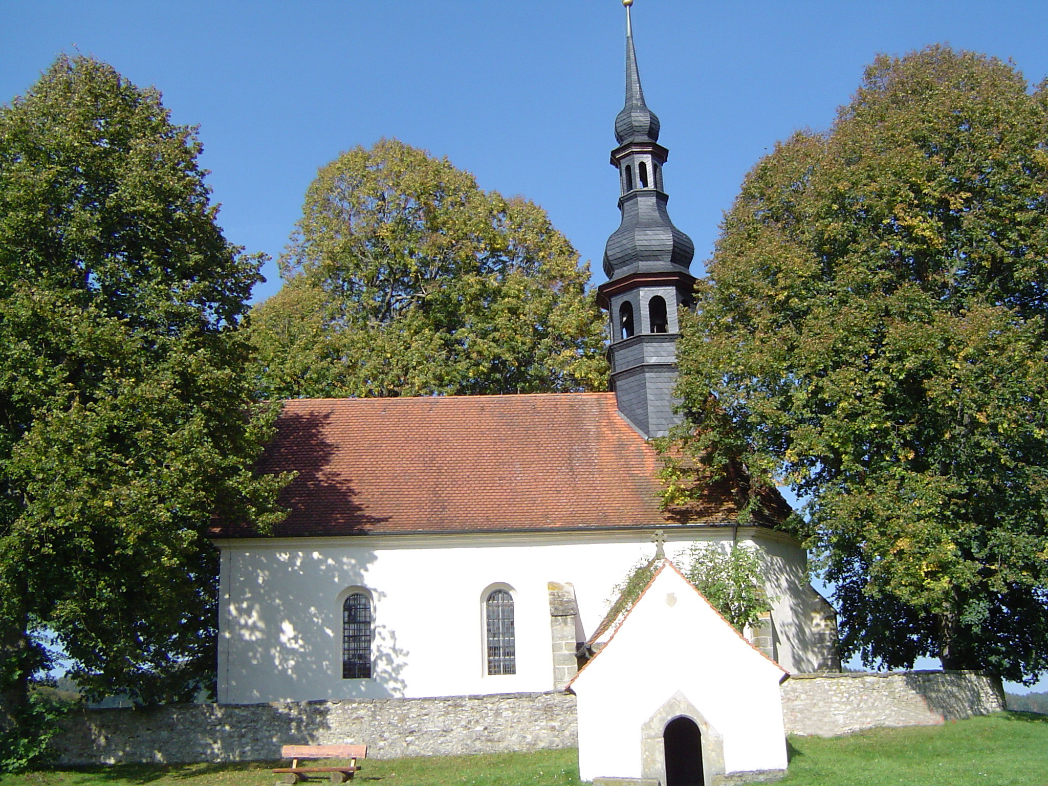 Obernsees, Evangelisch-lutherische Rupertuskapelle, Sankt-Rupertus-Straße 155, Denkmalgeschütztes Gebäude (Akten-Nr. D-4-72-167-20)